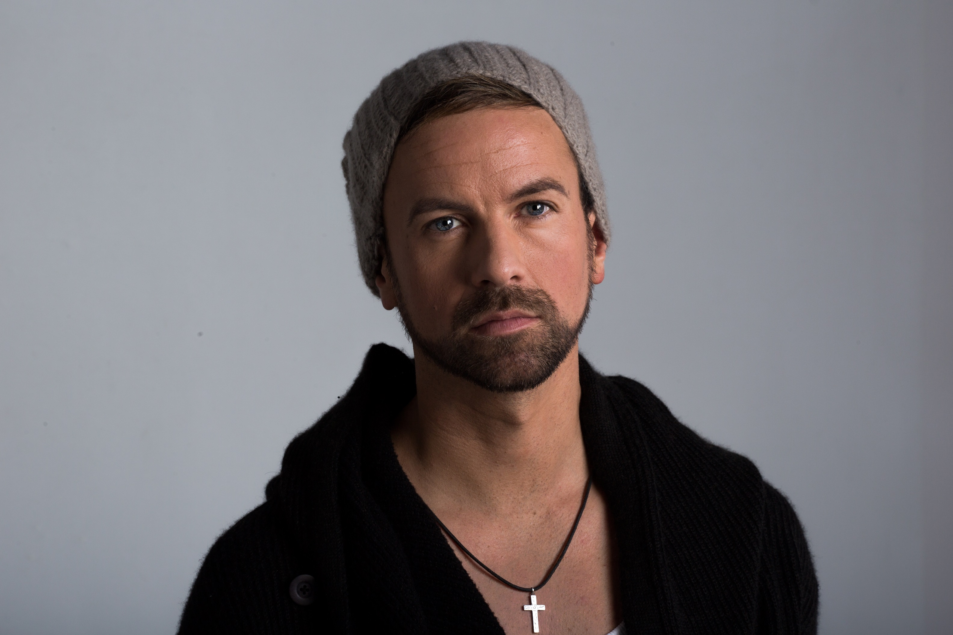 Pressefoto von Joel Brandenstein